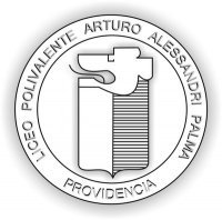 Insignia Liceo Arturo Alessandri Palma